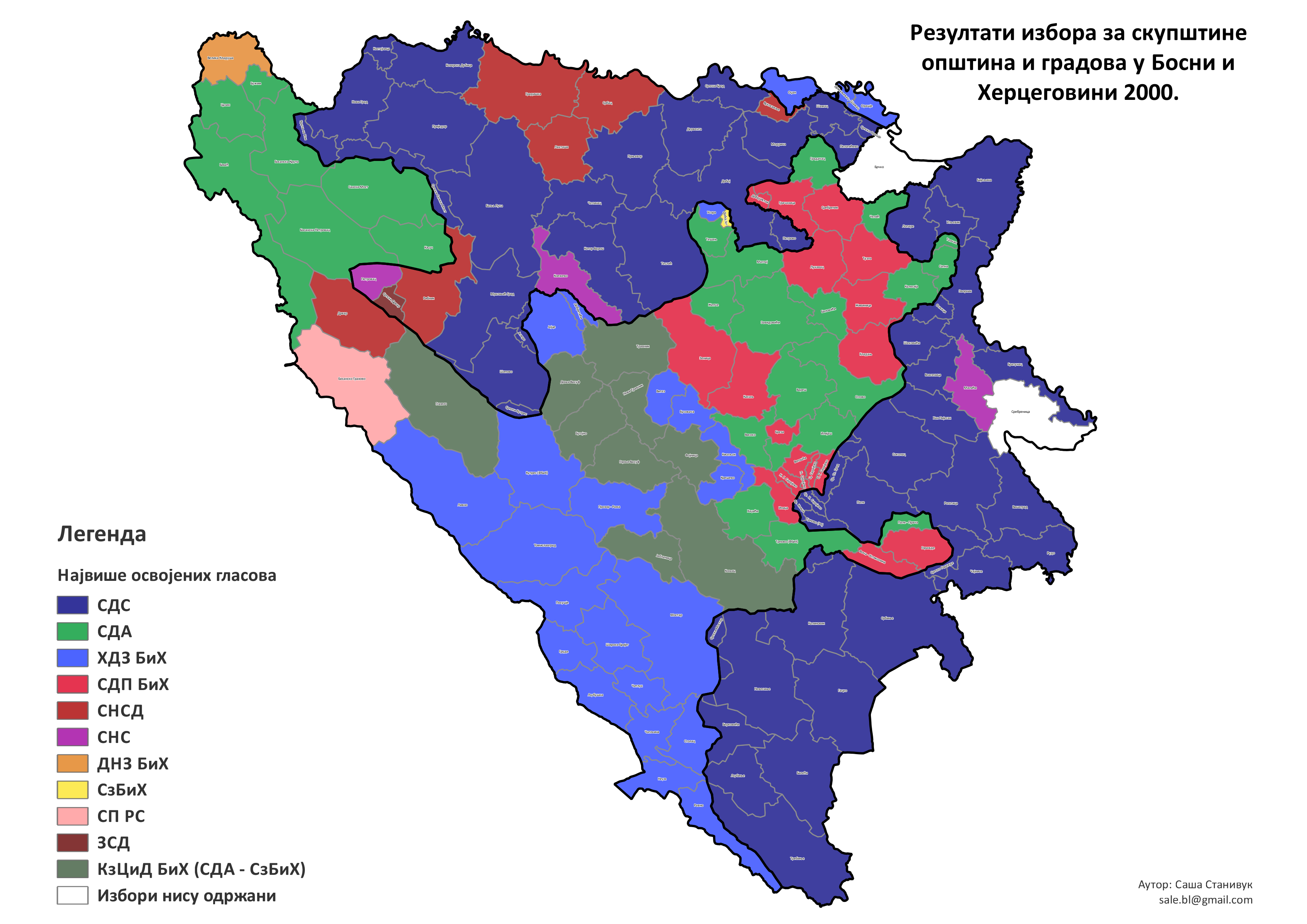 Српски (ћирилица): Резултати избора за скупштине општина и градова у Босни и Херцеговини 2000. године.